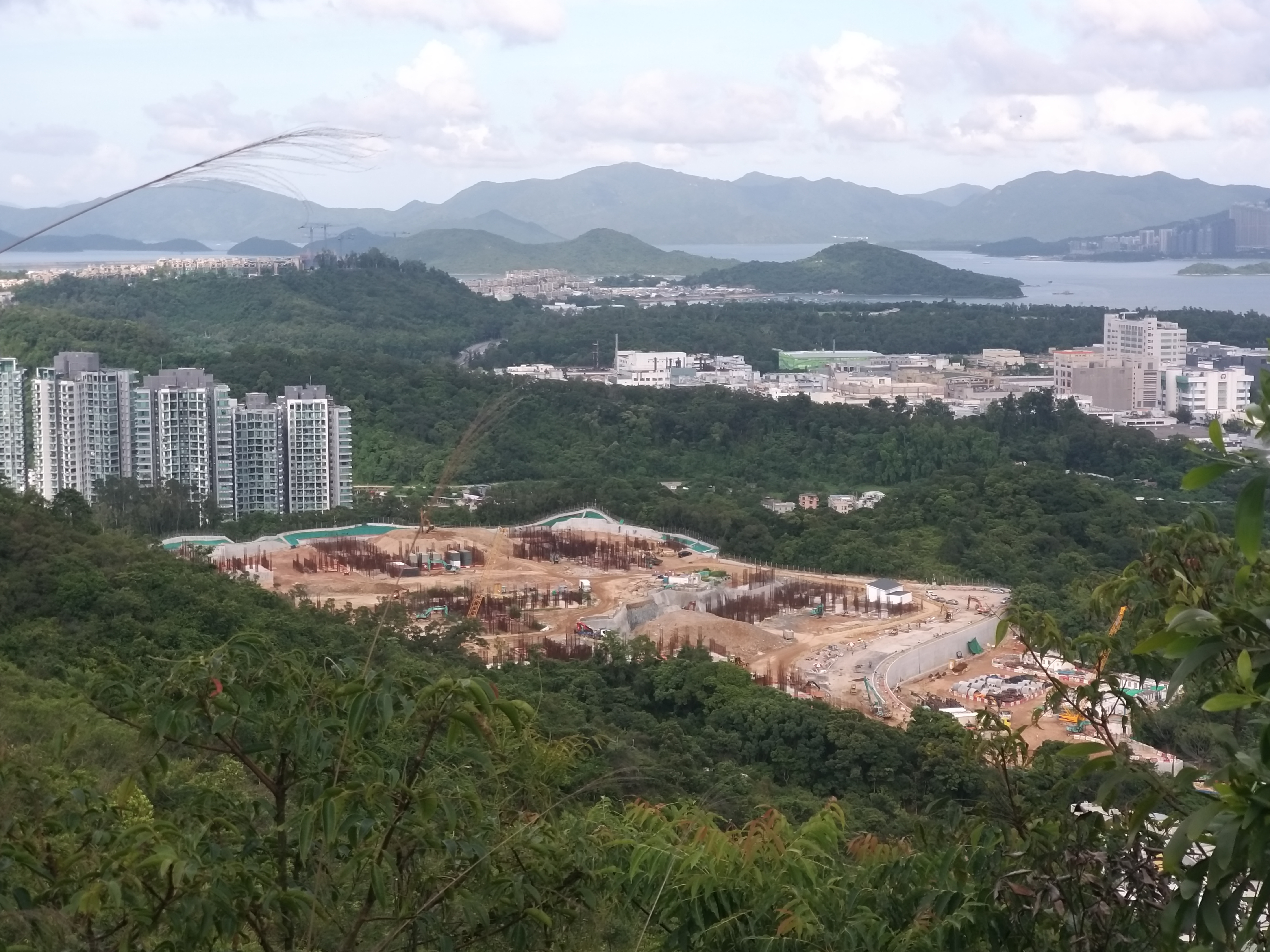 地基工程大致完成，目前正進行回填及斜坡整理工程